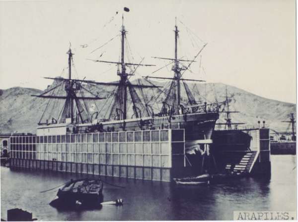 Fragata Arapiles. Número de inventario: 1871-58-FF00001.